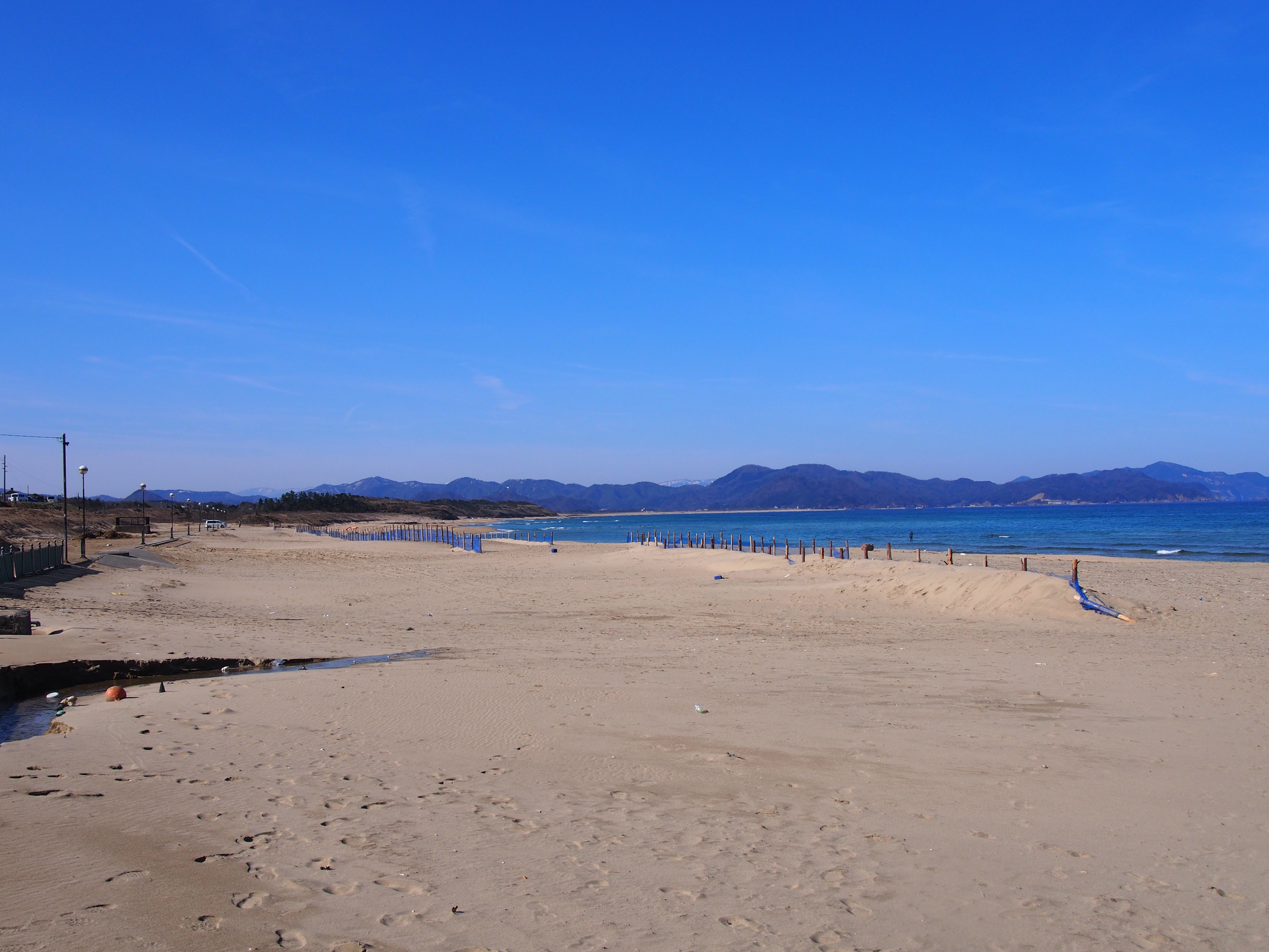 夕日ヶ浦（京都府京丹後市網野町浜詰） 浜詰地区から西側を臨む。 Olympus E-PL5